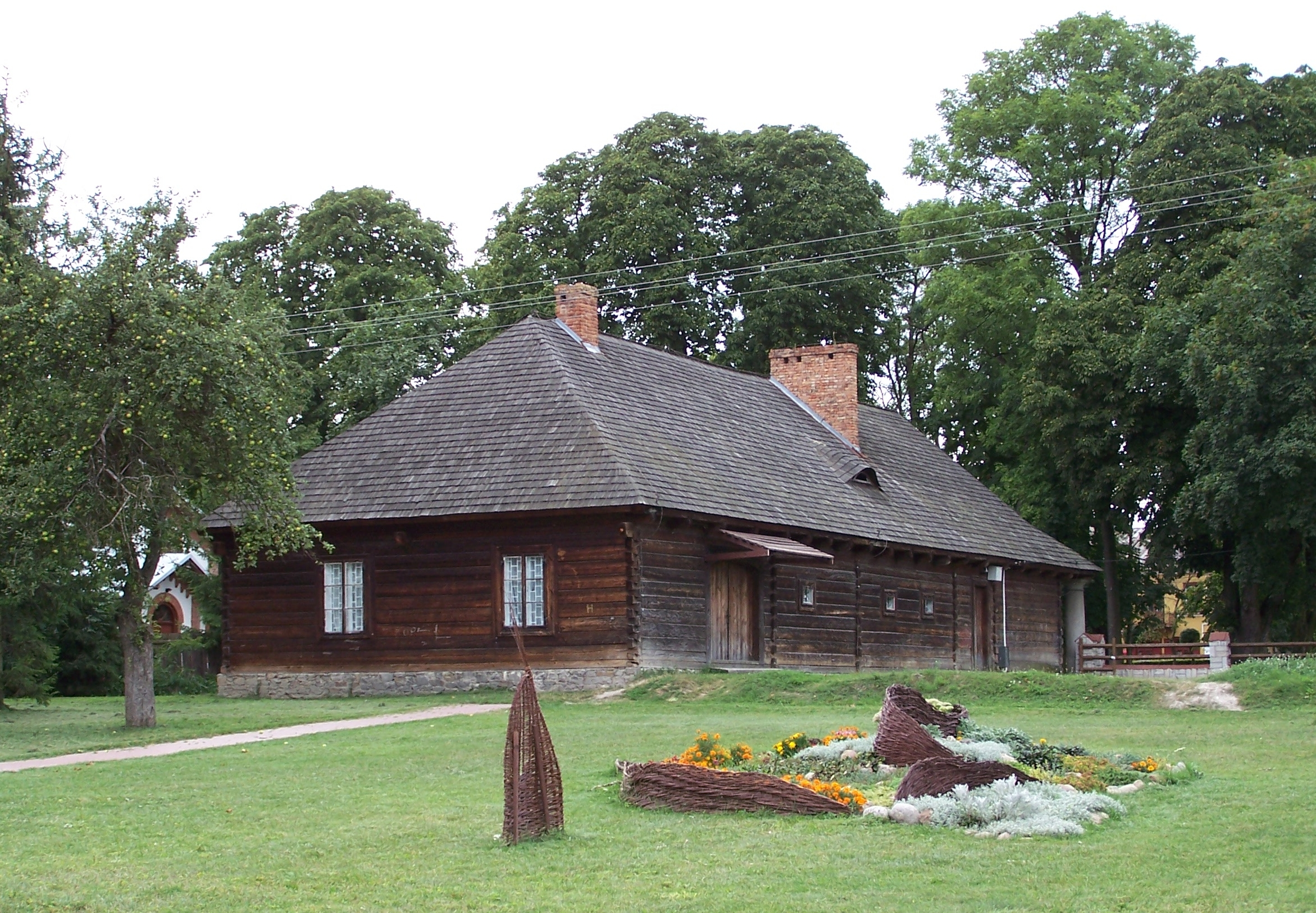 Solec nad Wisłą, Rynek 10 - "Dom z podcieniami", drewniany, k. XVIII w., 1970. Widok z tyłu (od wschodu)